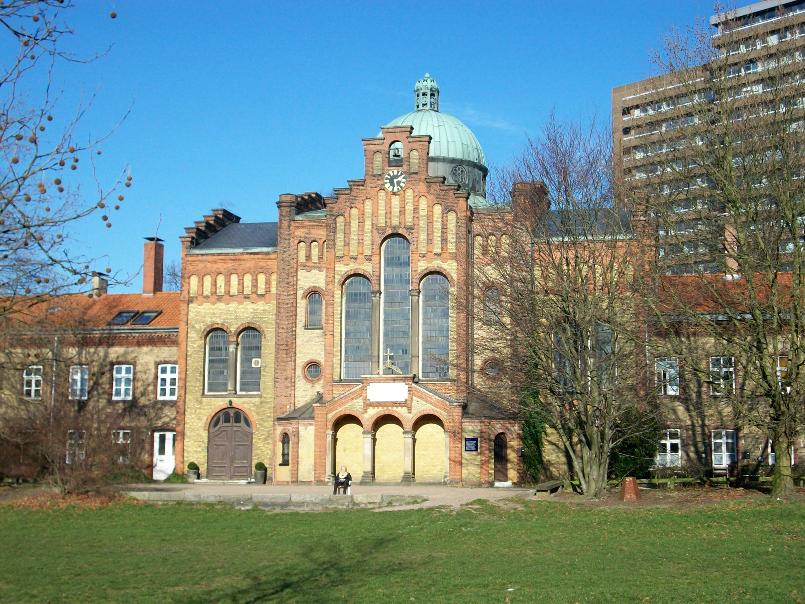 Das Schröderstift, Schröderstiftstrasse 34 in Hamburg-Eimsbüttel. Gestiftet von Johann Heinrich Schröder, erbaut im Stile des Historiums 1852, nach Plänen des Architekten Albert Rosengarten. 1896 erweitert nach Plänen von Albert Petersen.